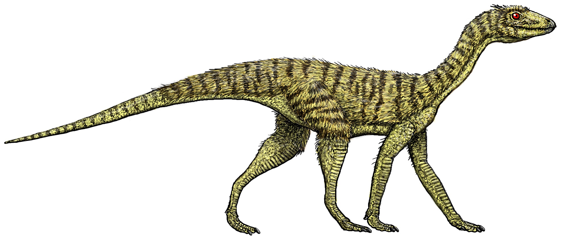 Credit Dr. Jeff Martz/NPS